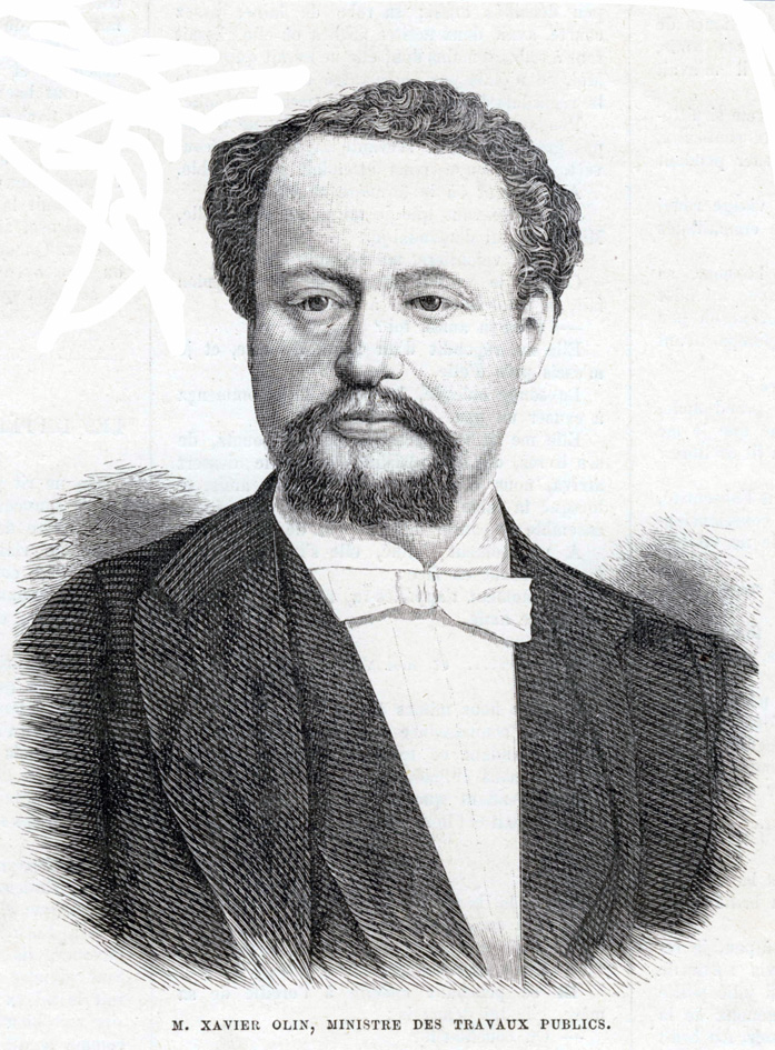 Portrait de Xavier Olin, ministre belge des Travaux publics, publié dans l'Illustration européenne (1882)